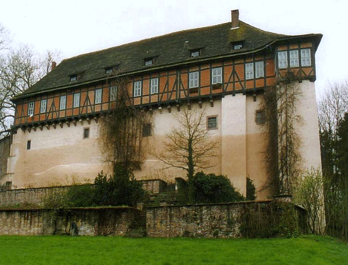 Schloss Nienover, Schloss Südflügel, südliche Fassade, von Süd nach Nord